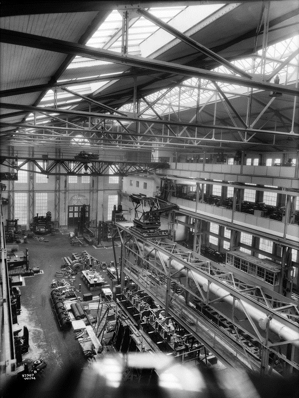 Akers mekaniske verksted, interiør, verkstedhall.